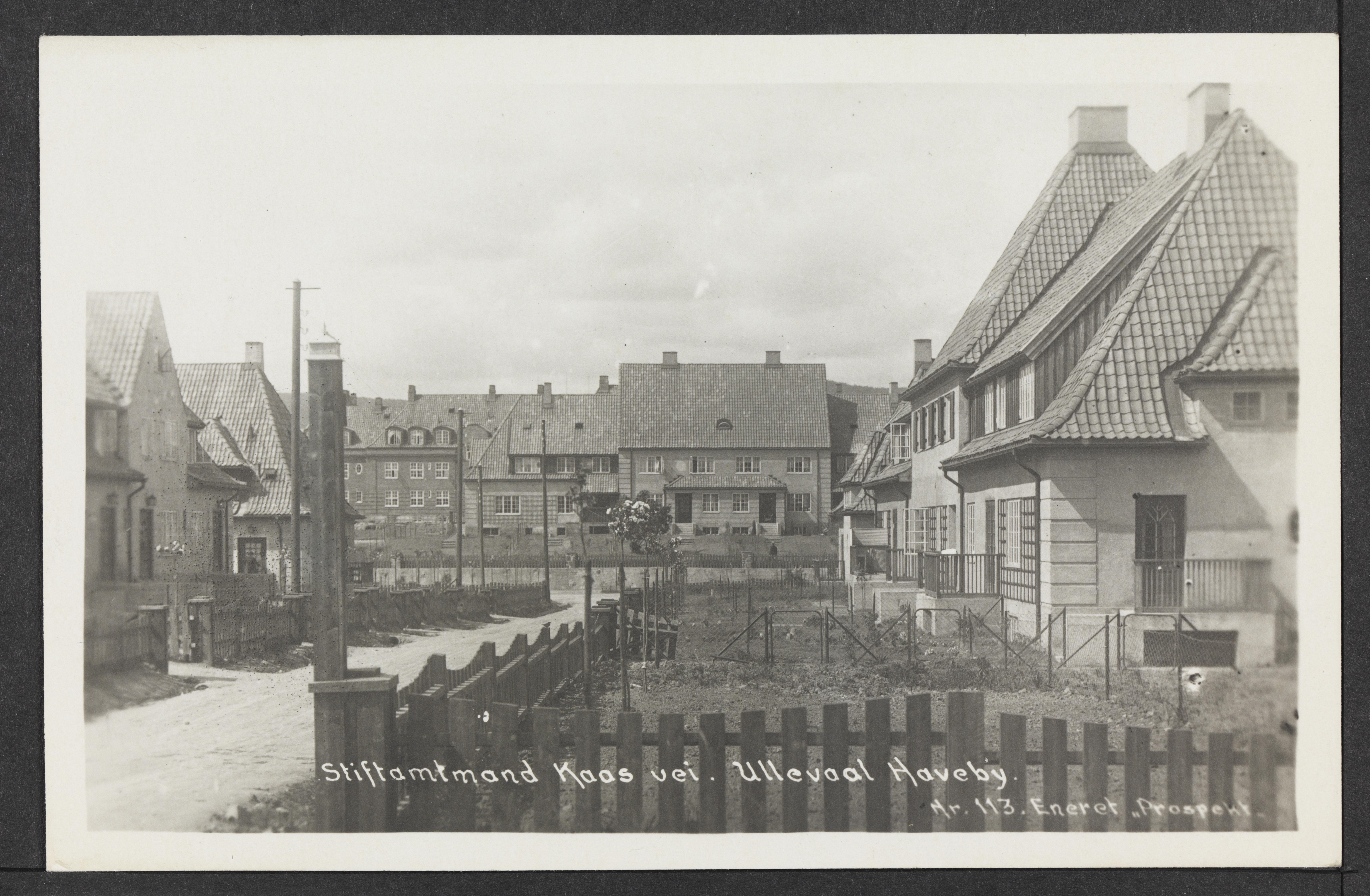 Bildet er hentet fra Nasjonalbibliotekets bildesamling Stiftamtmann Kaas' vei,Ullevål, Oslo, Oslo